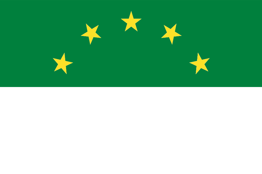 Bandera de Sigchos